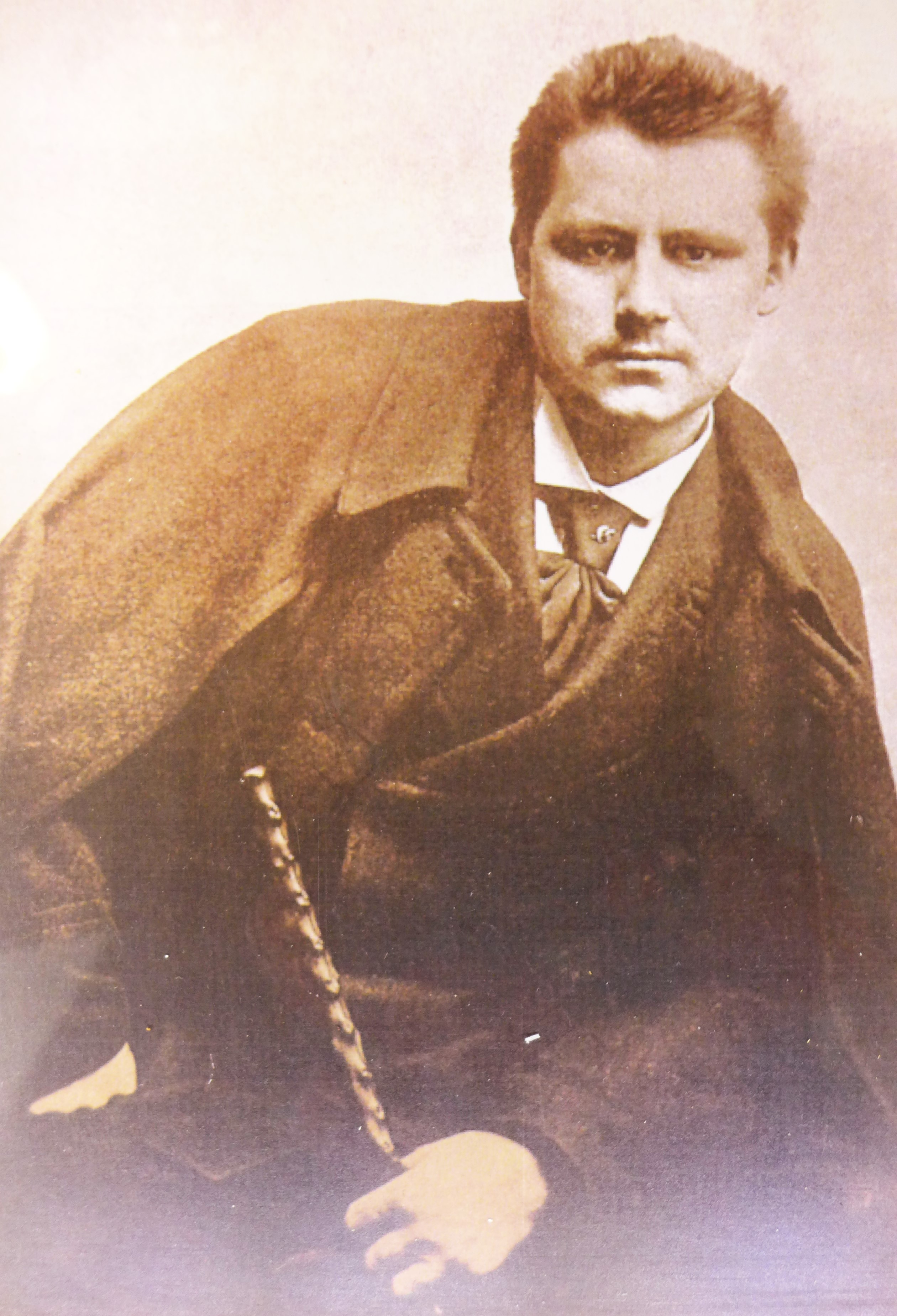 Henri Loux (* 20. Februar 1873 in Auenheim, Elsass; † 19. Januar 1907 in Straßburg), Keramikmuseum Saargemünd